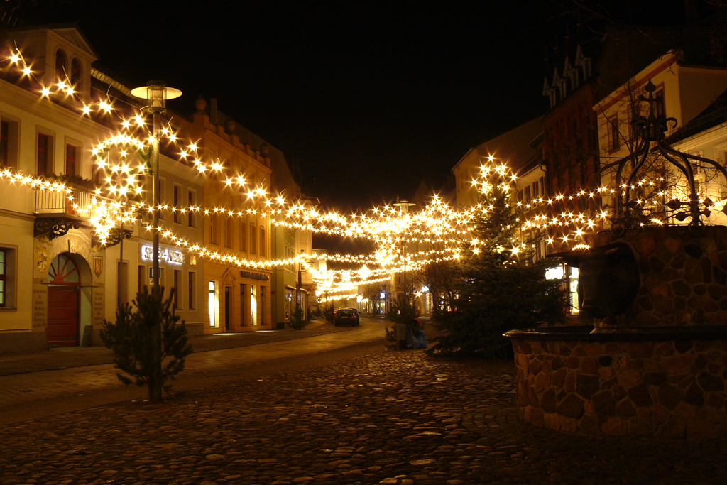 Zu den traditionellen Lichterfesten weihnachtlich beleuchtete Innenstadt von Spremberg/ Brandenburg/ Deutschland.